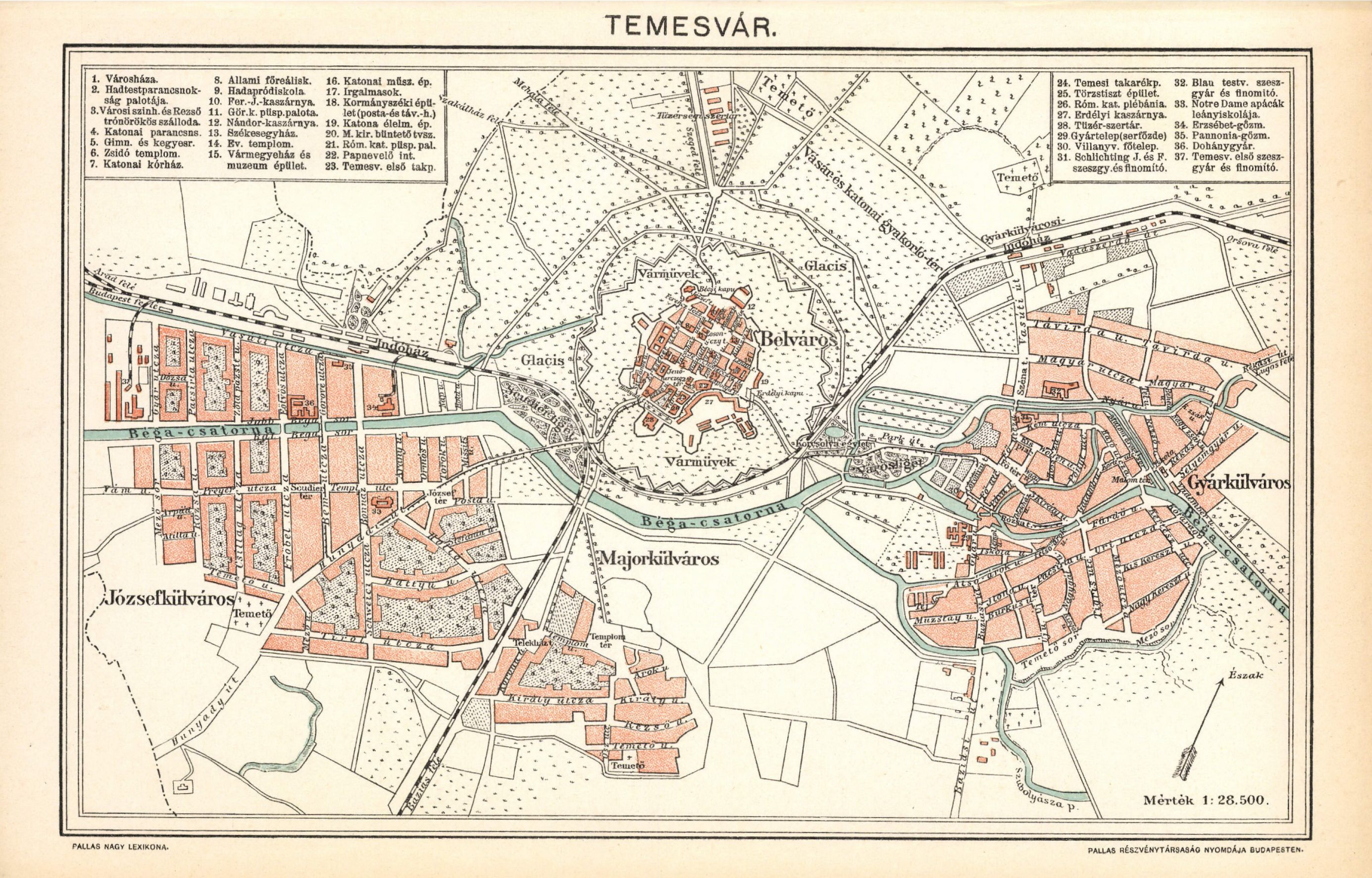 Pallas nagy lexikona, Temesvár város térképe valamikor Trianon előtt a milleniumi idők körül.